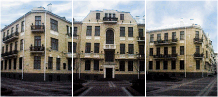 Беларуская (тарашкевіца): Жылы дом па вуліцы Савецкай, 17. Быў пабудаваны Станіславам Гайдукевічам.